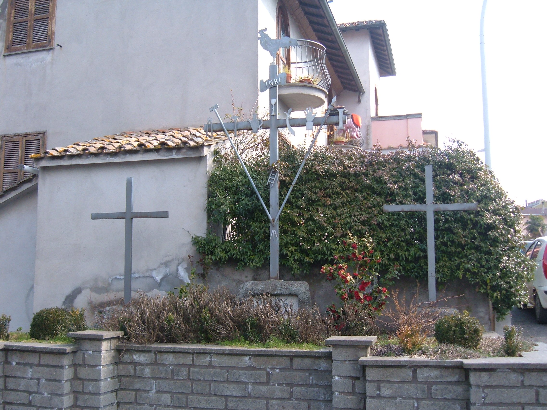 Le tre croci della frazione Tre Croci nel comune di Vetralla (VT).